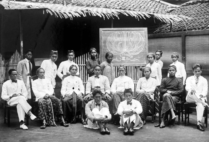 Repronegatief. Onderwijzend personeel van het Nationaal Onderwijs Instituut Taman Siswo te Yogyakarta, Java